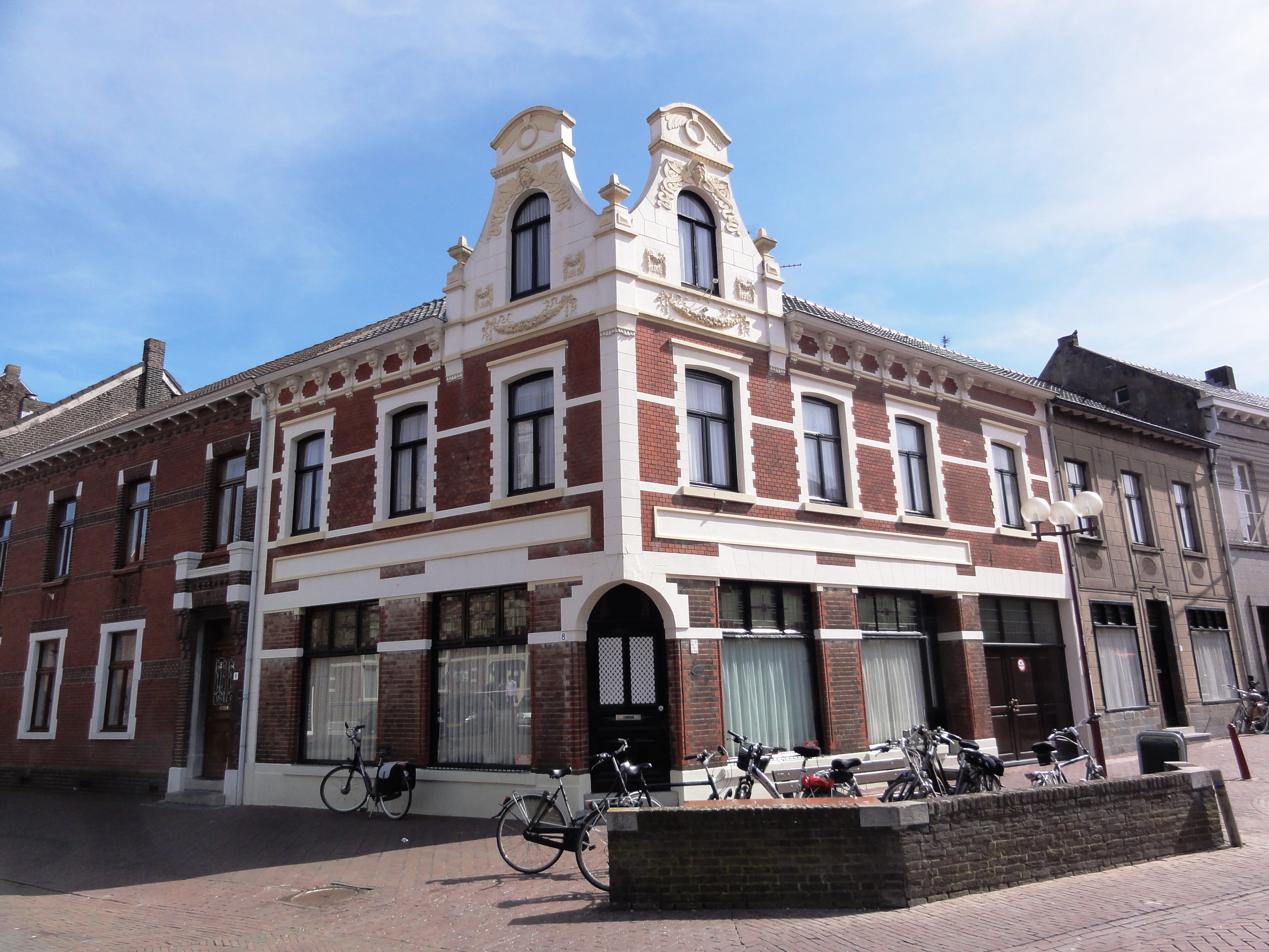 Echt, Limburg, hoekhuis Plats 8.